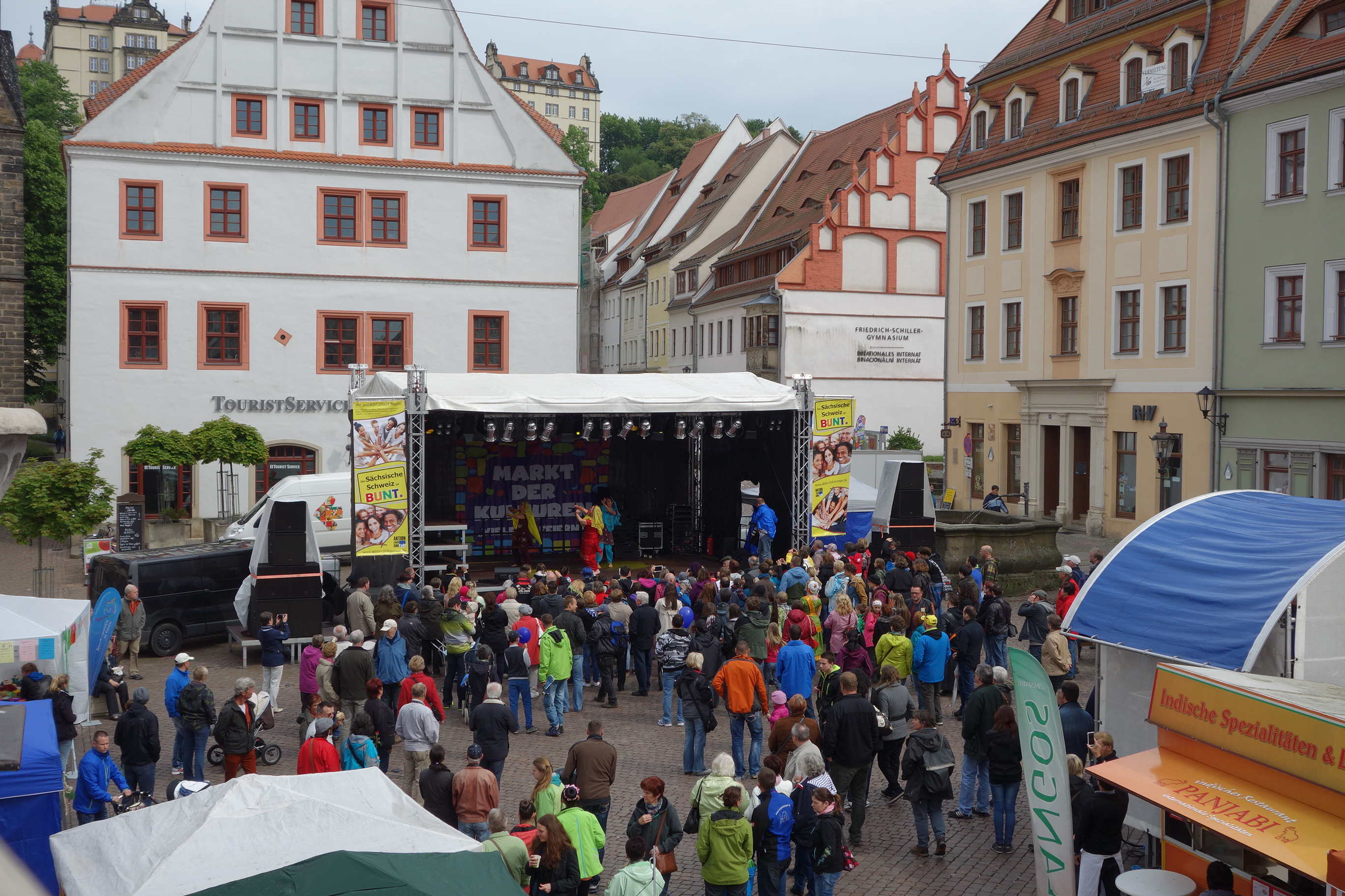 Markt der Kulturen 2014, große Bühne